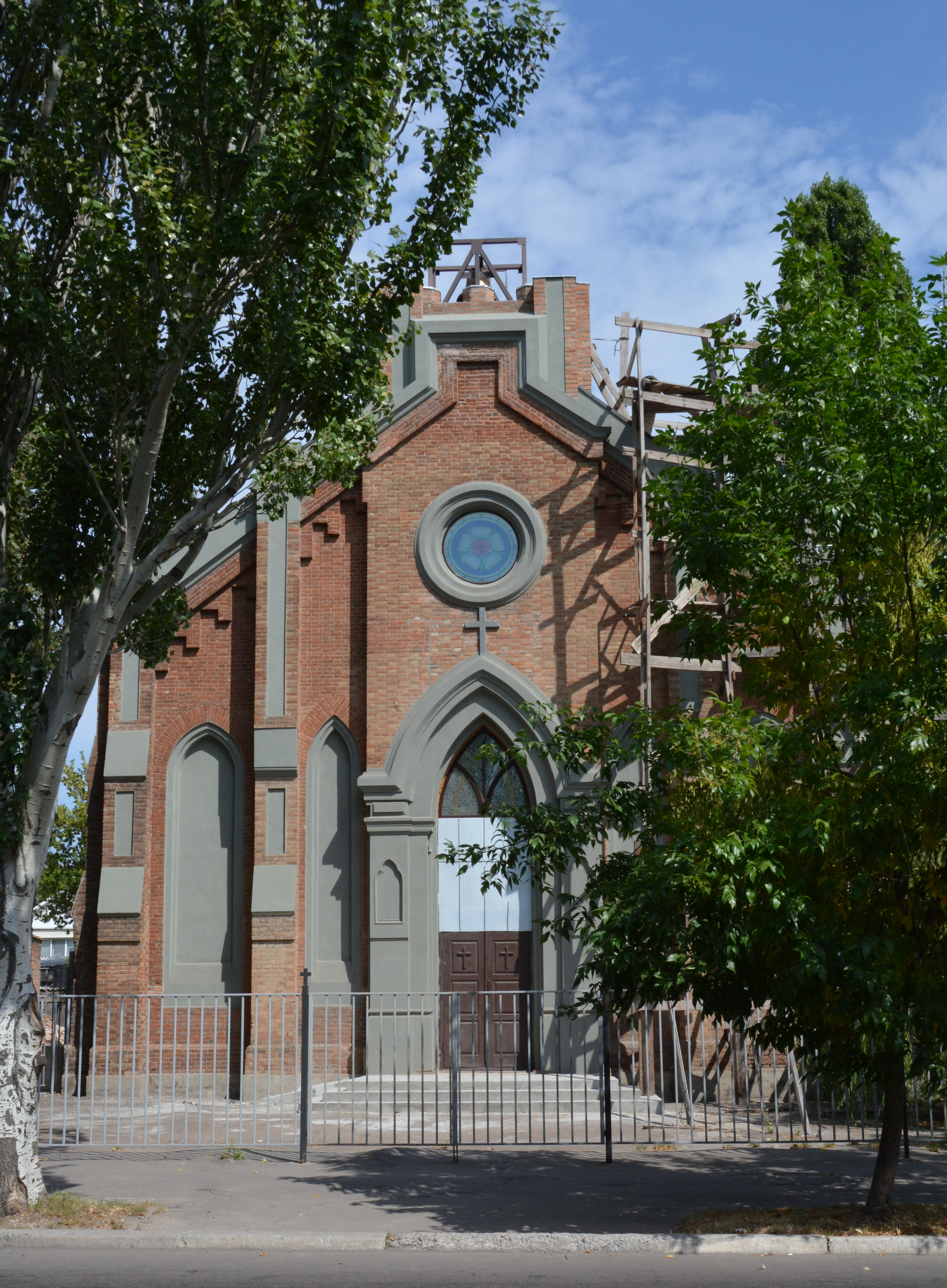 Лютеранська кірха, Бердянськ, вул. Горбенко, 23